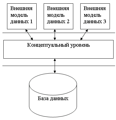 База Данных